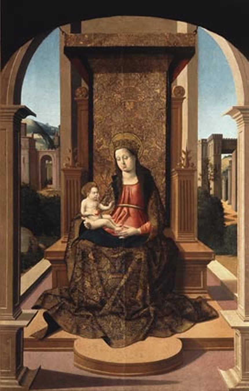 La obra representa a la Virgen María llevando en brazos a su hijo, el Niño Jesús.